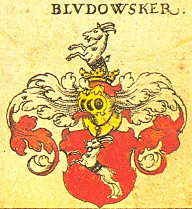 Johann Siebmacher: New Wappenbuch eingescannt aus: Horst Appuhn (Hrsg.), Johann Siebmachers Wappenbuch. Die bibliophilen Taschenbücher 538, 2. verb. Aufl , Dortmund 1989 Freiherren und Herren Blatt 29